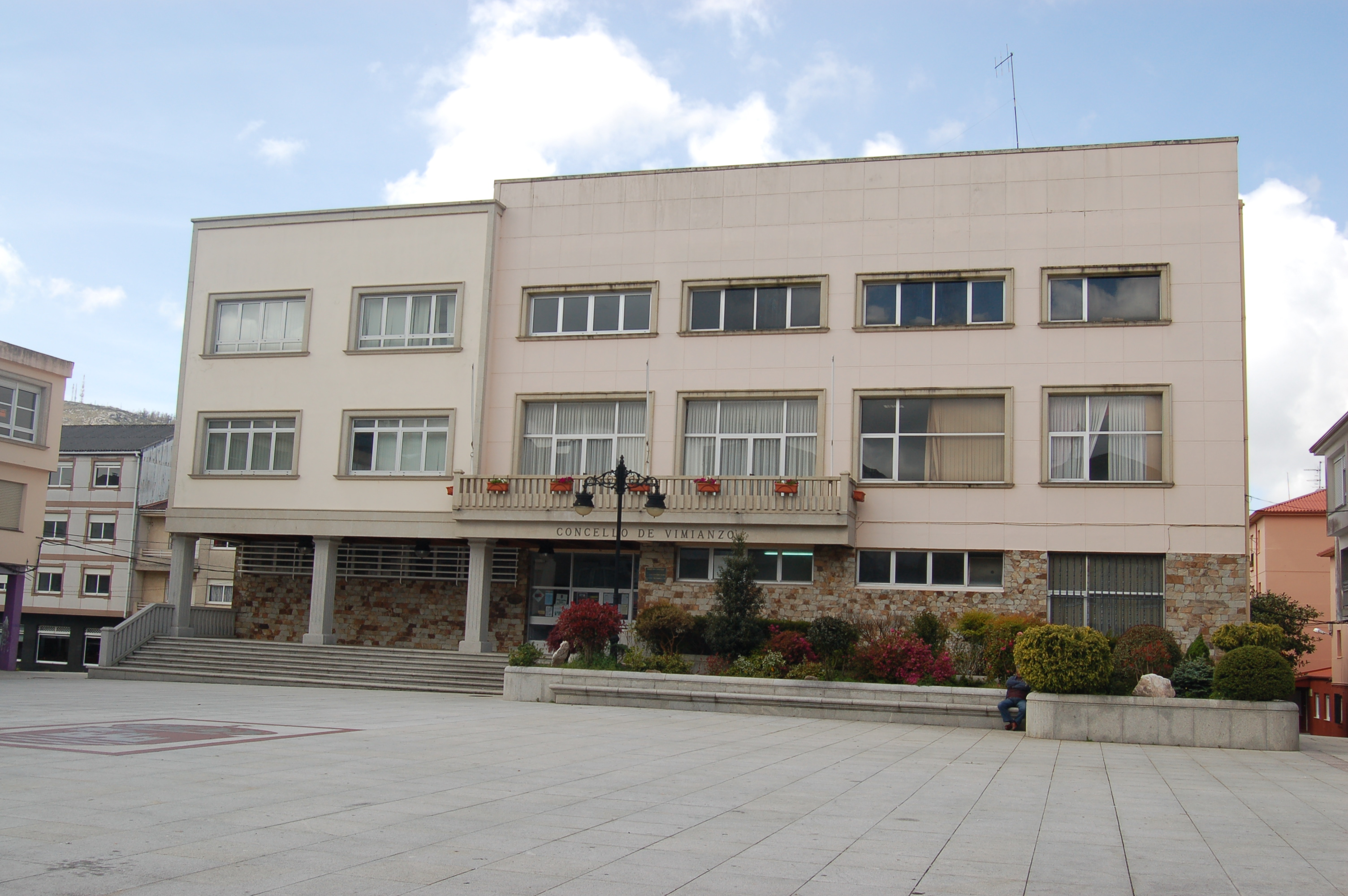 casa consistorial de Vimianzo Vimianzo Categoría:Imaxes de Vimianzo